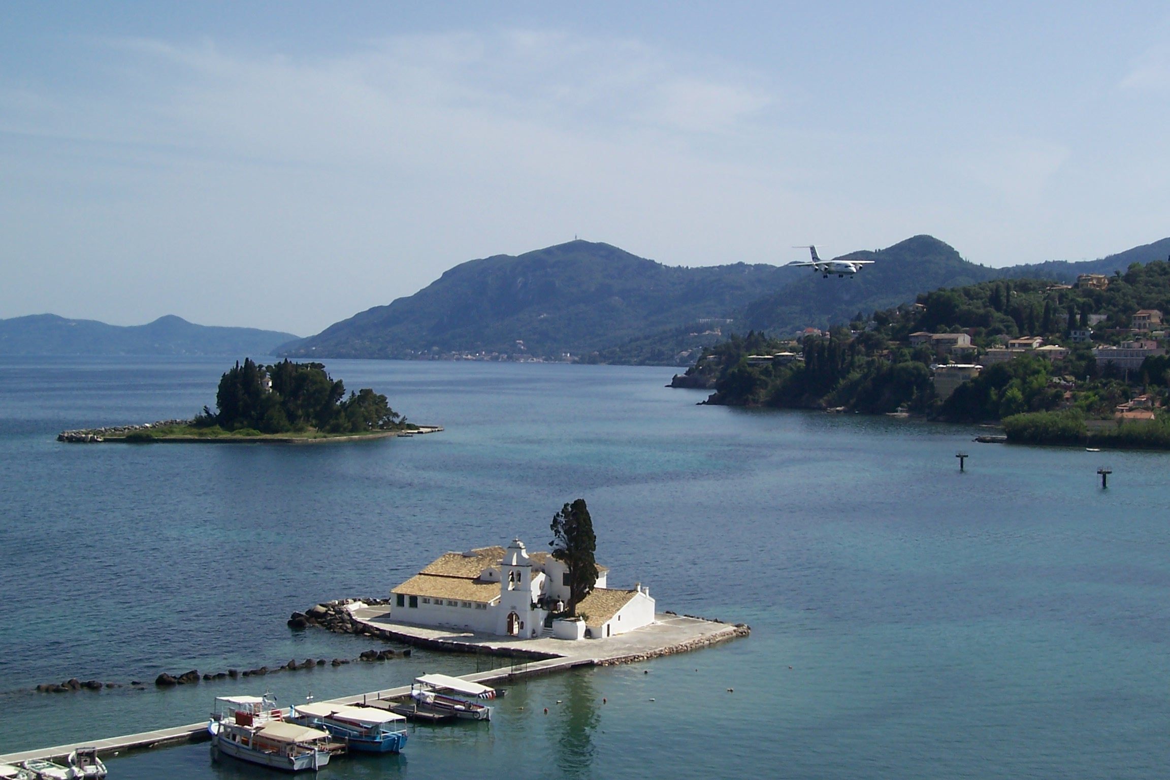 Klosterinsel Vlacherna und die "Mäuseinsel" Pontikonissi